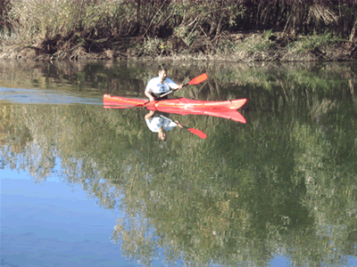 testburan06